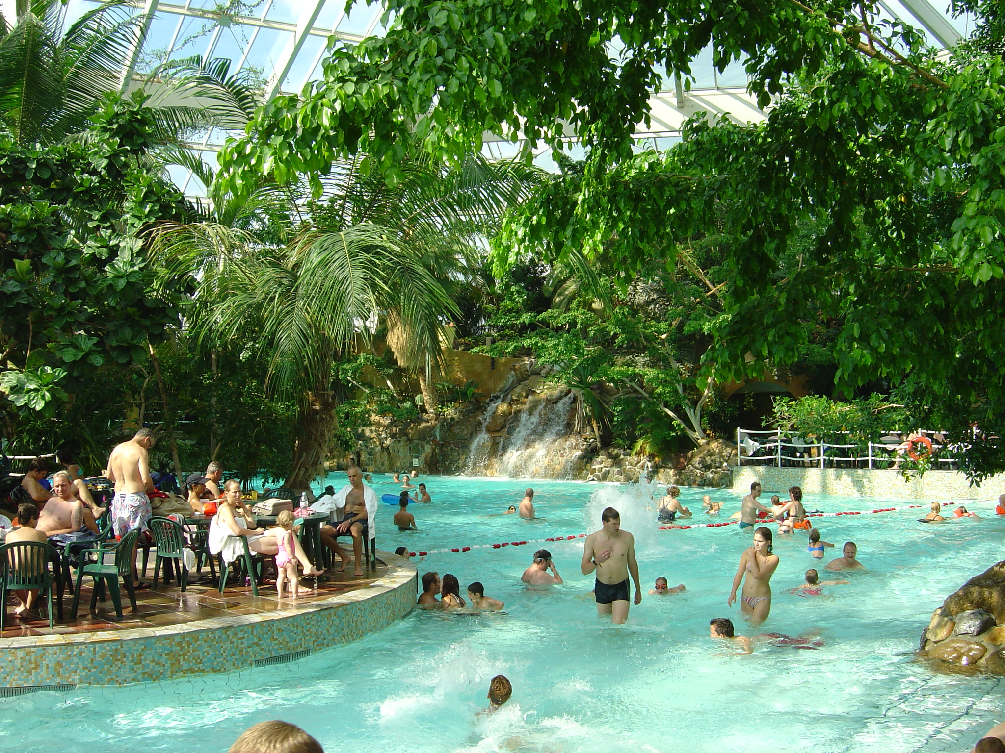 Centerparcs - De Vossemeren